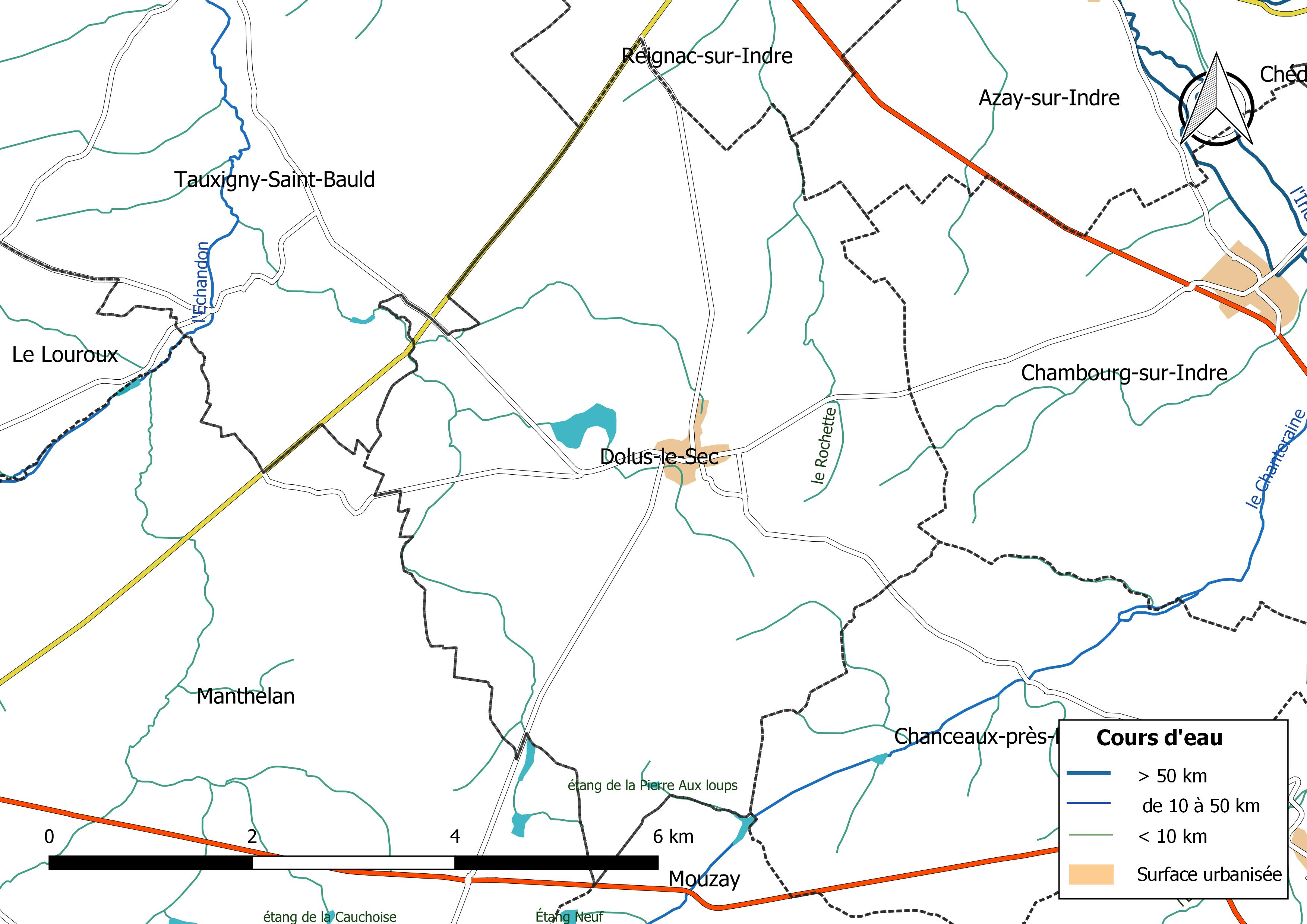 Carte du réseau hydrographique de la commune de Dolus-le-Sec (France).